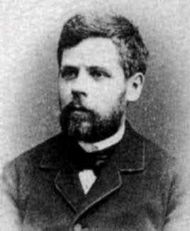 Fotografie von Friedrich Schottky